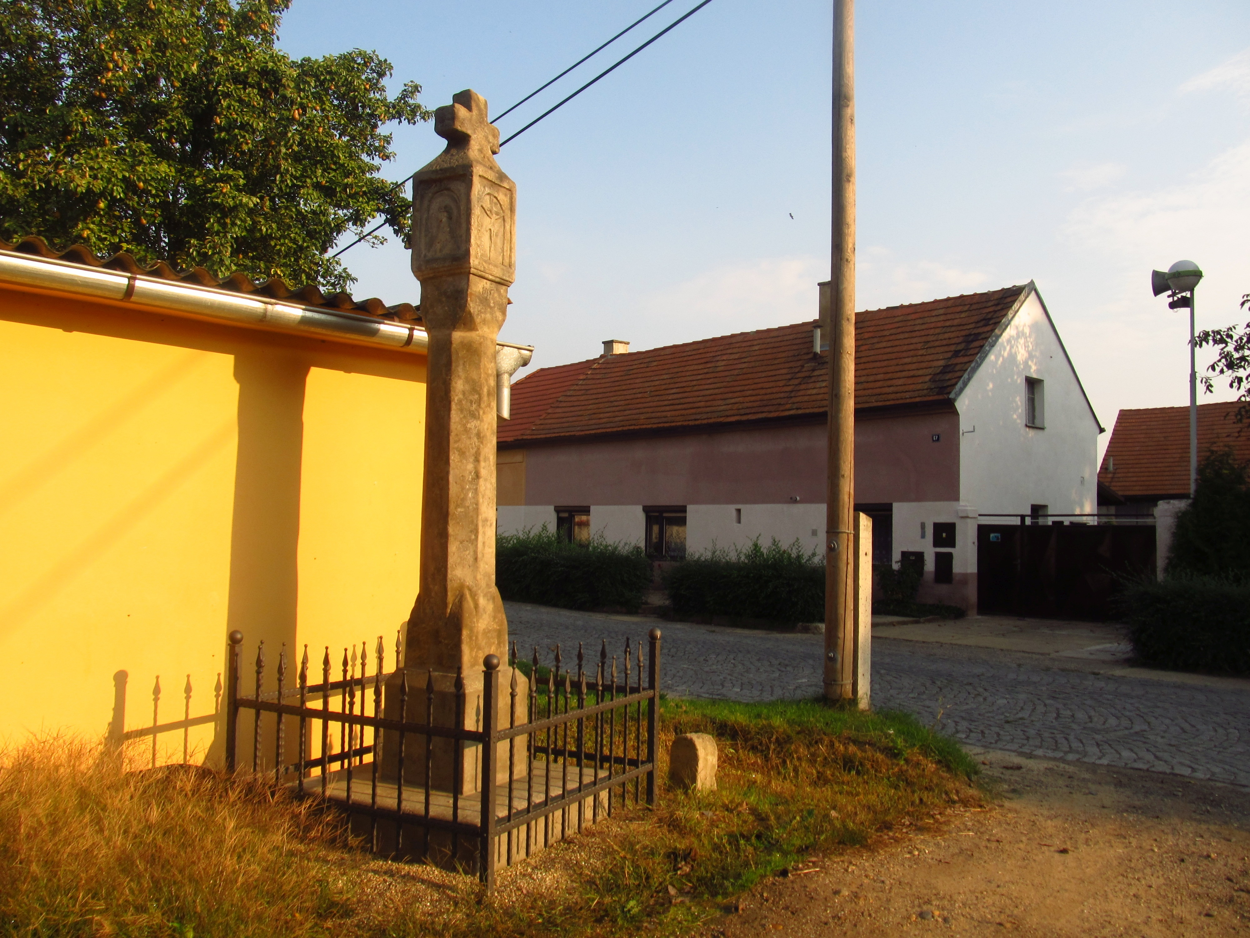 Boží muka u čp. 10, Nové Dvory (okres Litoměřice).